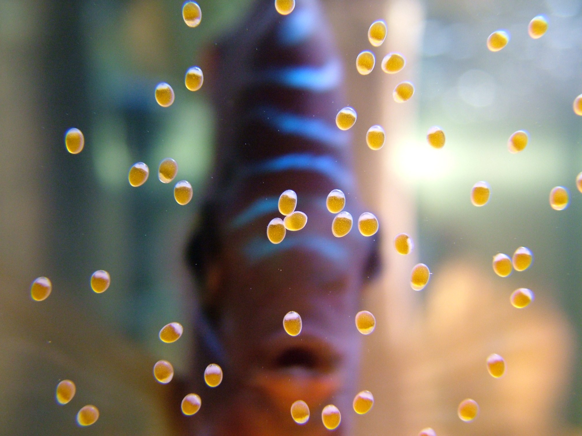 Laich (Gelege) des Diskus an einer Aquariumsscheibe